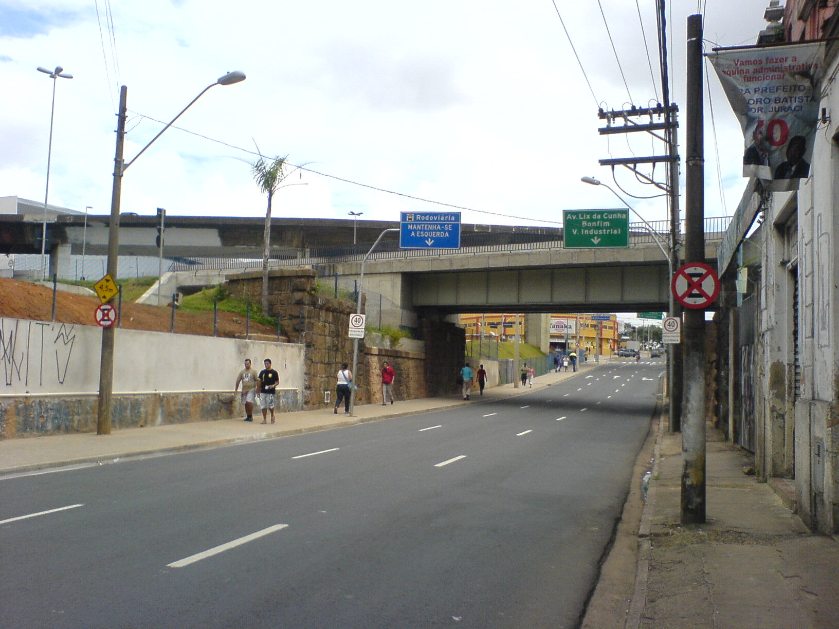 Regiao da Rodoviaria - Antiga ponte da ferrovia Sorocabana, depois foi usado pro antigo Metrô VLT, agora de uso exclusivo para ônibus